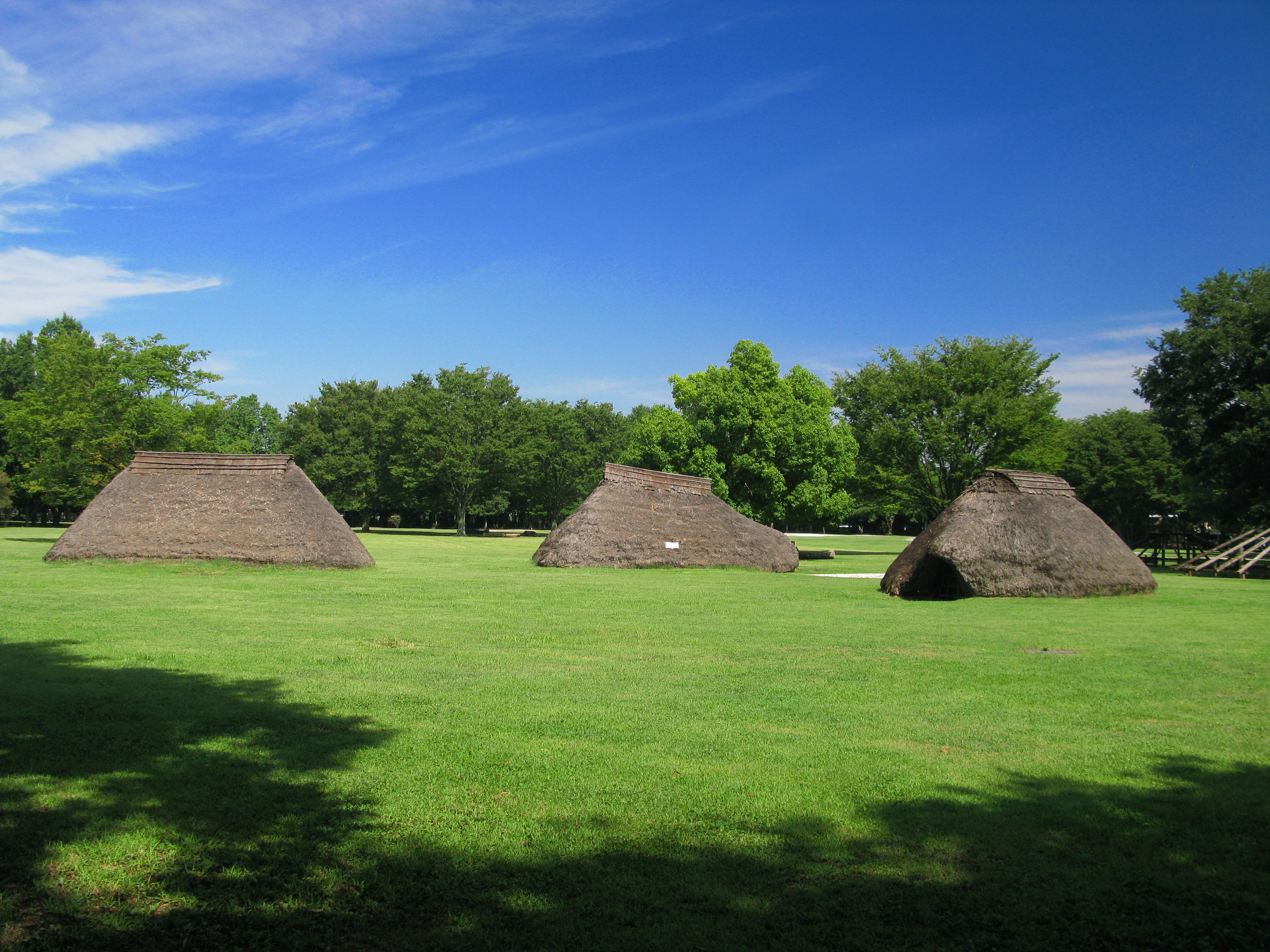 Mizuko Shell Mound, Fujimi, Saitama, Japan